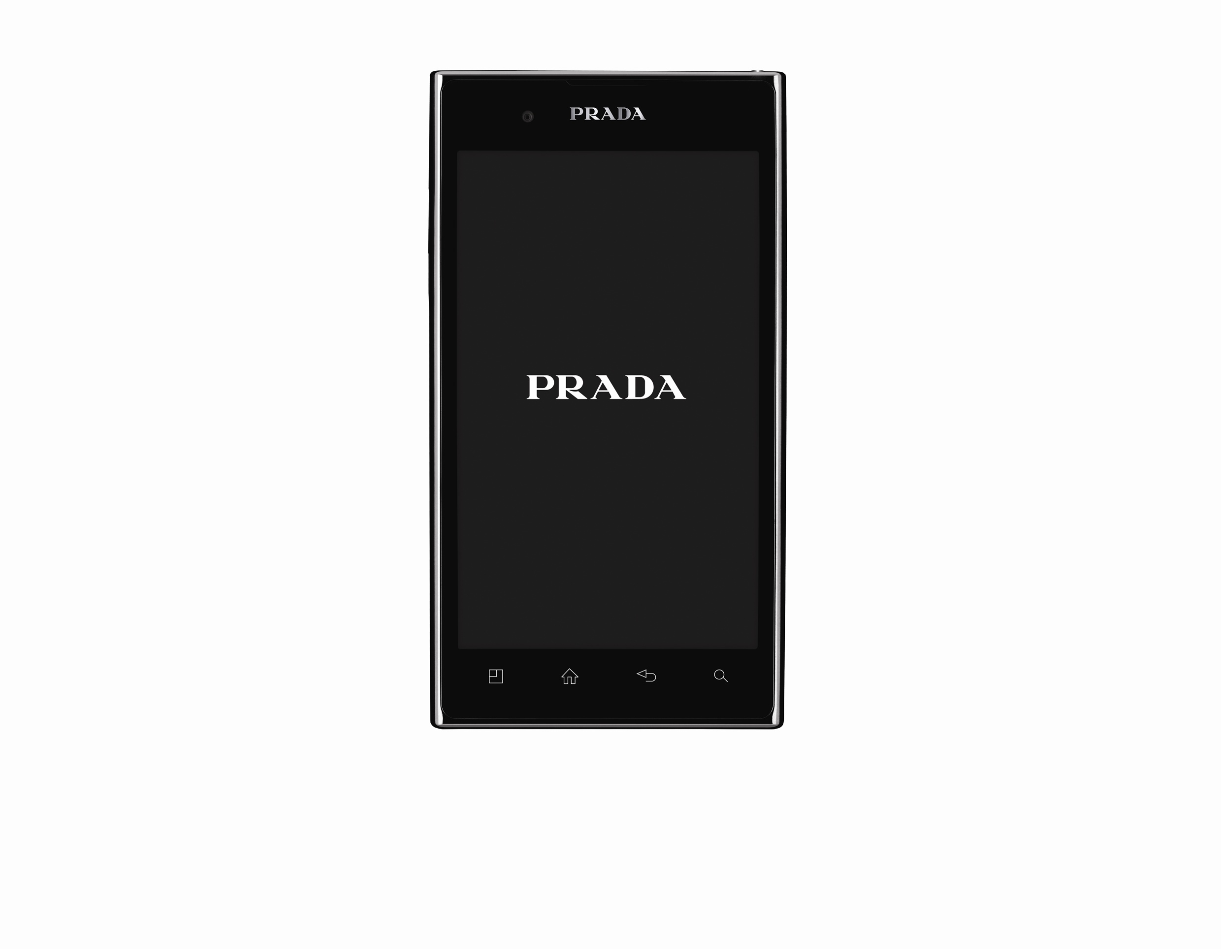 ※ LG전자 뉴스룸 에서 관련 보도자료를 확인실 수 있습니다.